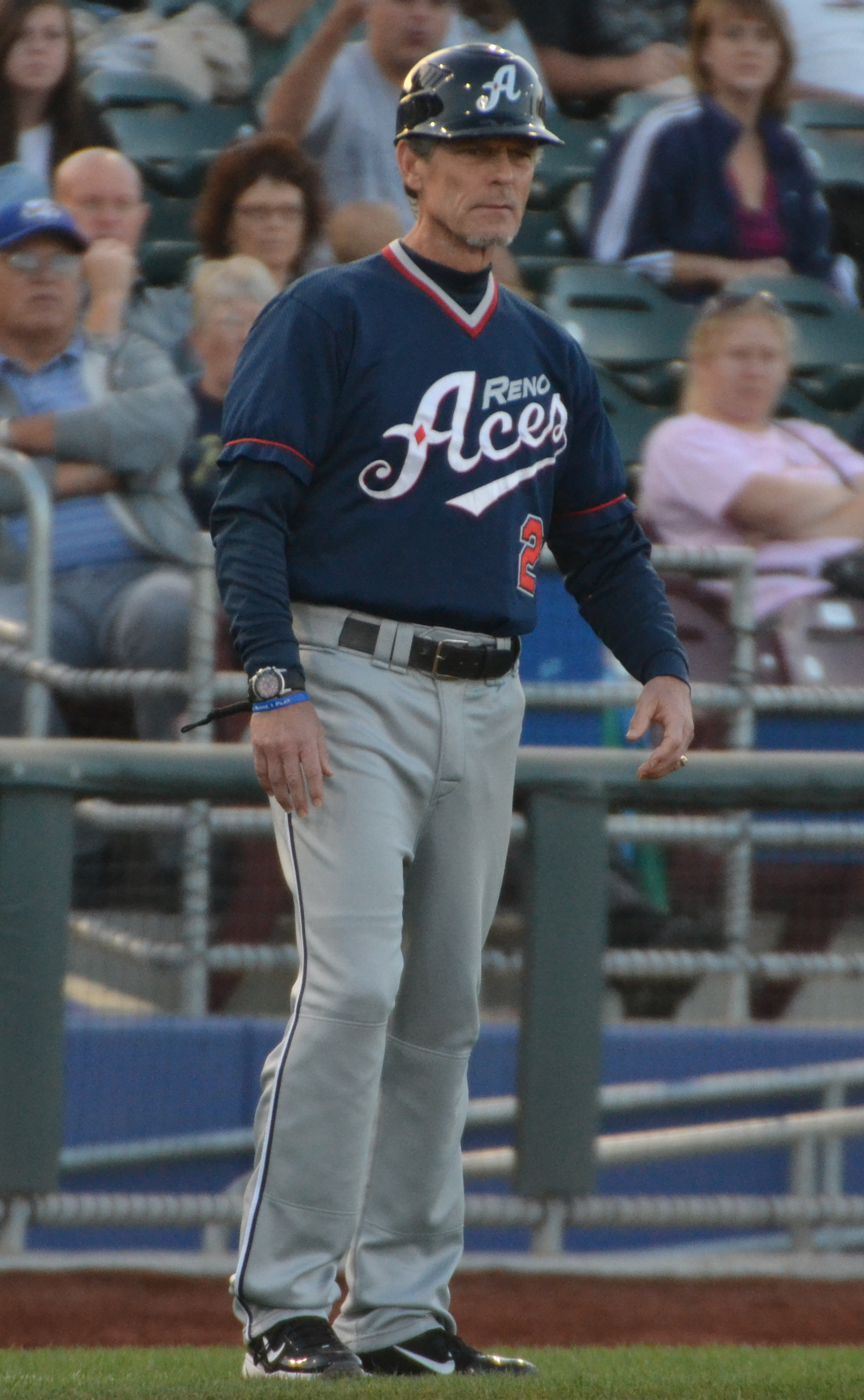 Brett Butler